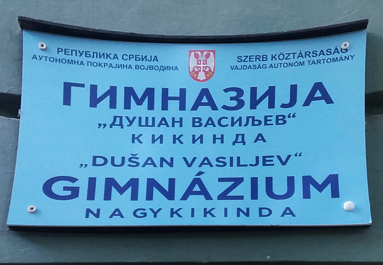 Srpski (latinica): Tabla sa nazivom gimnazije Dušan Vasiljev u Kikindi